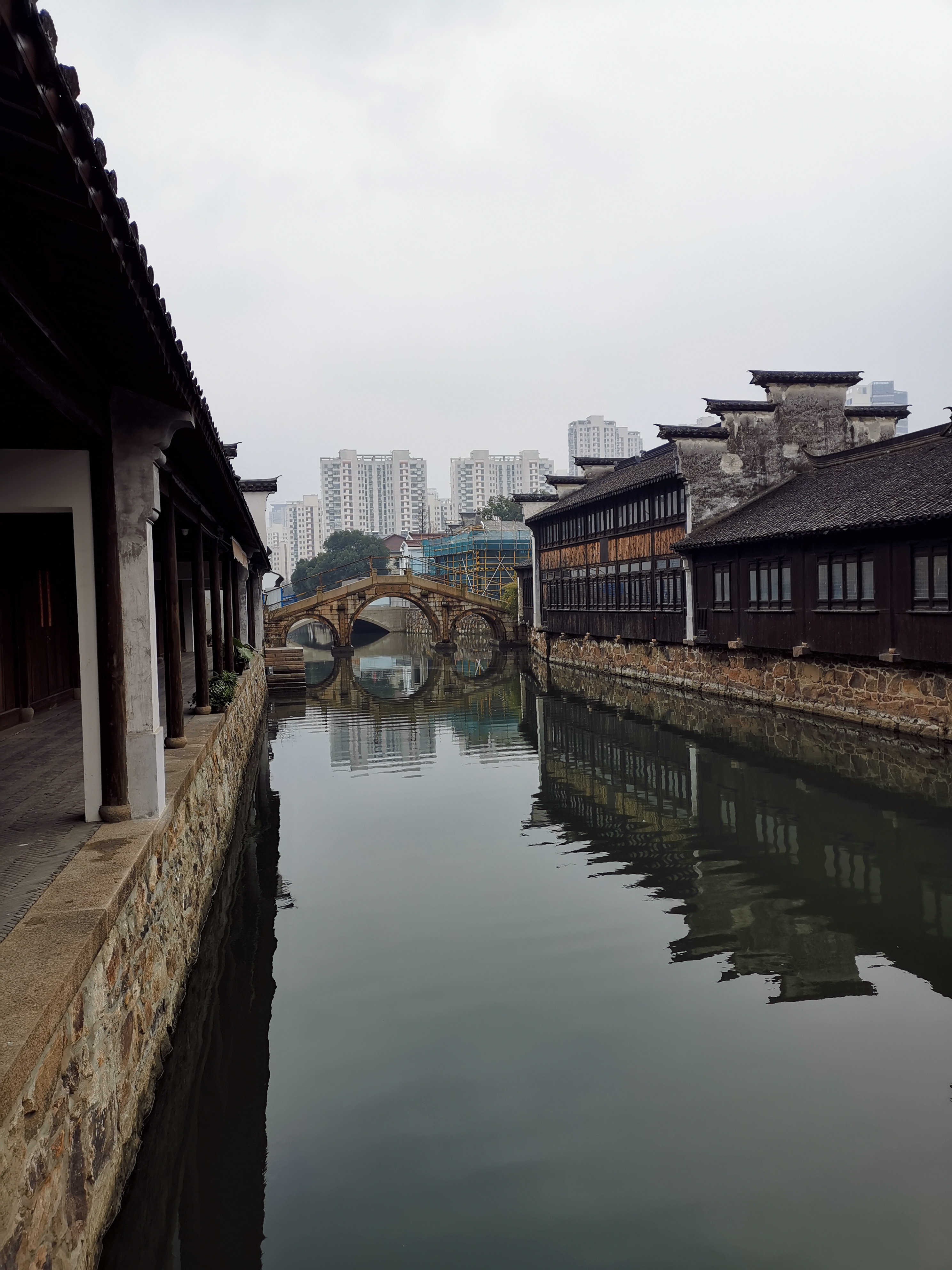 无锡 周新古镇 周新桥